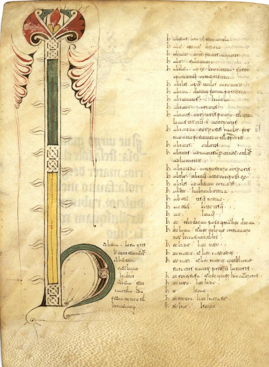 Folio 72v. Inicio de la letra "h" (miniada) del Glossarium latinum. Manuscrito fechado entre el 6 y el 13 de junio del año 964. Biblioteca de la Real Academia de la Historia (España). Signatura: Cod. 46. Ubicación antigua: olim F 212 y 44 Biblioteca Virtual del Patrimonio Bibliográfico (España): BVPB20100000502. 172 folios. Contiene: Glossarium latinum (1r-168r). Glossae super canones de concilio apostolorum (168r-170v). Litterae Graecae (170v). Versus ad pueros (poema de Ermoldus Nigellus transmitido solo por este códice, 170v-171r). Notula (171r). Aenigma (171r). De crue Domini (171r). Tria principia: Deus, sìritus, corpus (h. 171v) Escritura visigótica. 172 folios (29 x 21 cm) en pergamino a 2 columnas (caja de escritura: 21 x 15 cm). Cuadernos de 8 (cuaterniones); signaturas en números romanos; foliación del siglo XVIII, a lápiz y en arábigos. Texto con lagunas y algunas hojas mutiladas. Capitales del Glossarium latinum (1r-168r) miniadas con lacerías, polícromas; hay notación musical aquitana al comienzo del folio 1r, en un himno de escritura carolina muy temprana. Titulado en el folio 1: Vocaulario [sic] latino Procedente el monasterio de San Millán de la Cogolla. Tras la desamortización, estuvo depositado en la biblioteca de Cortes desde donde recaló em la biblioteca de la Real Academia de la Historia. Referencias: Elisa Ruiz García, Catálogo de la sección de códices de la Real Academia de la Historia, Madrid, Real Academia de la Historia, 1997, págs. 281-284, cód. 46. Miguel C. Vivancos, Glosas de algunos manuscritos visigóticos, en